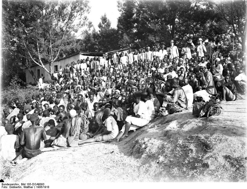 Arbeitergruppen